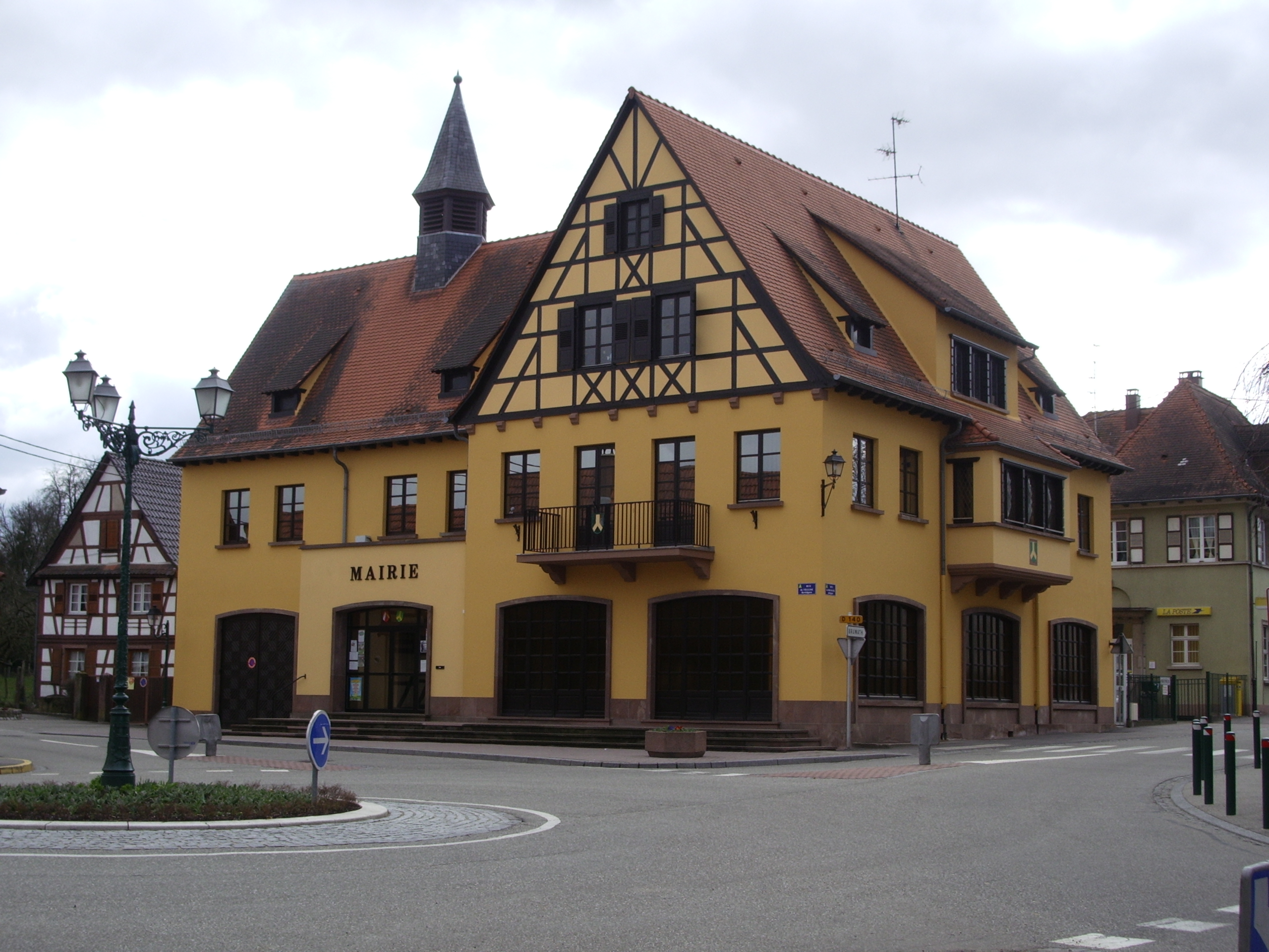 Photographie de la mairie de Weitbruch (France, Bas-Rhin).